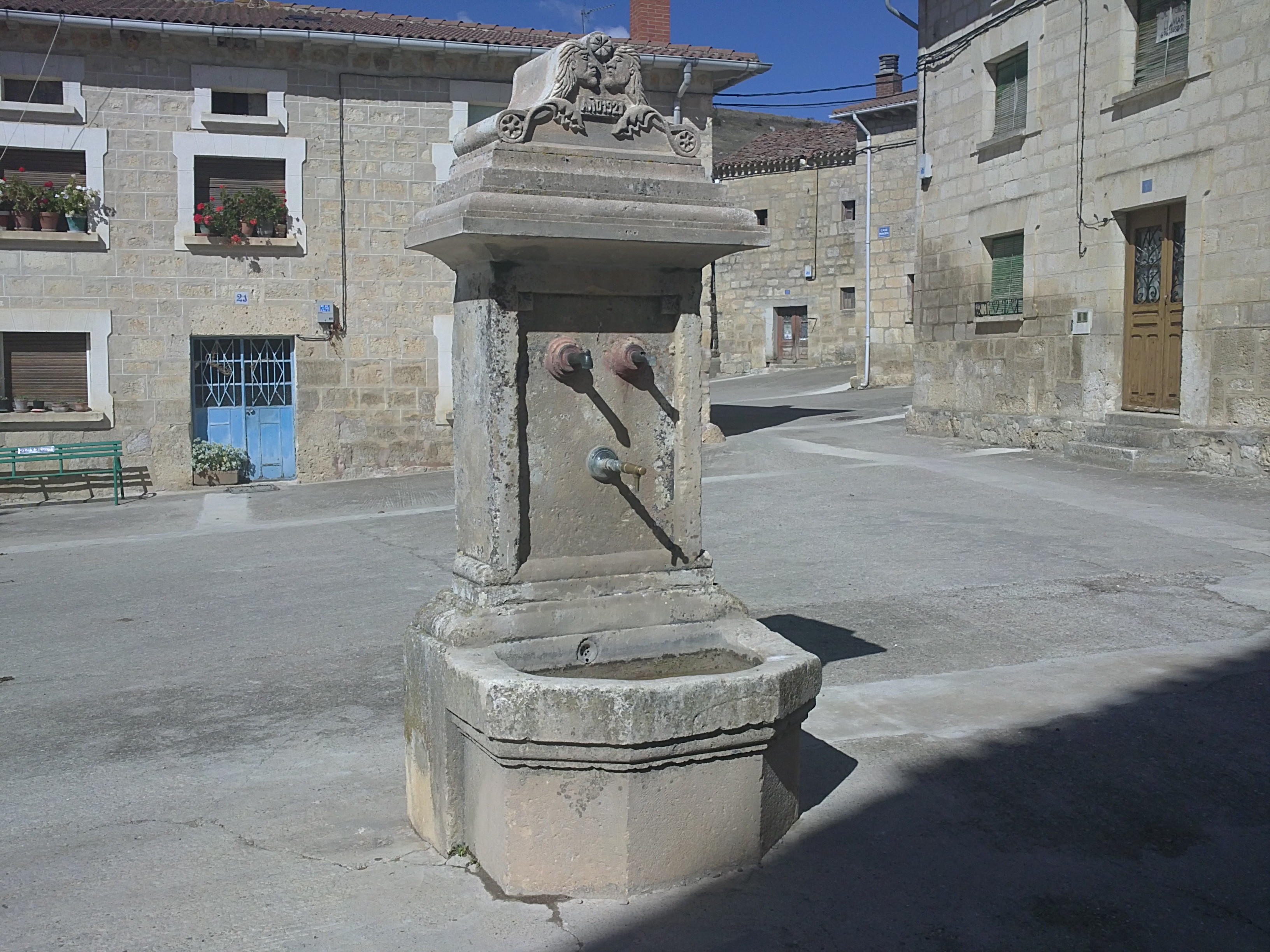 Fuente situada al lado de la iglesia